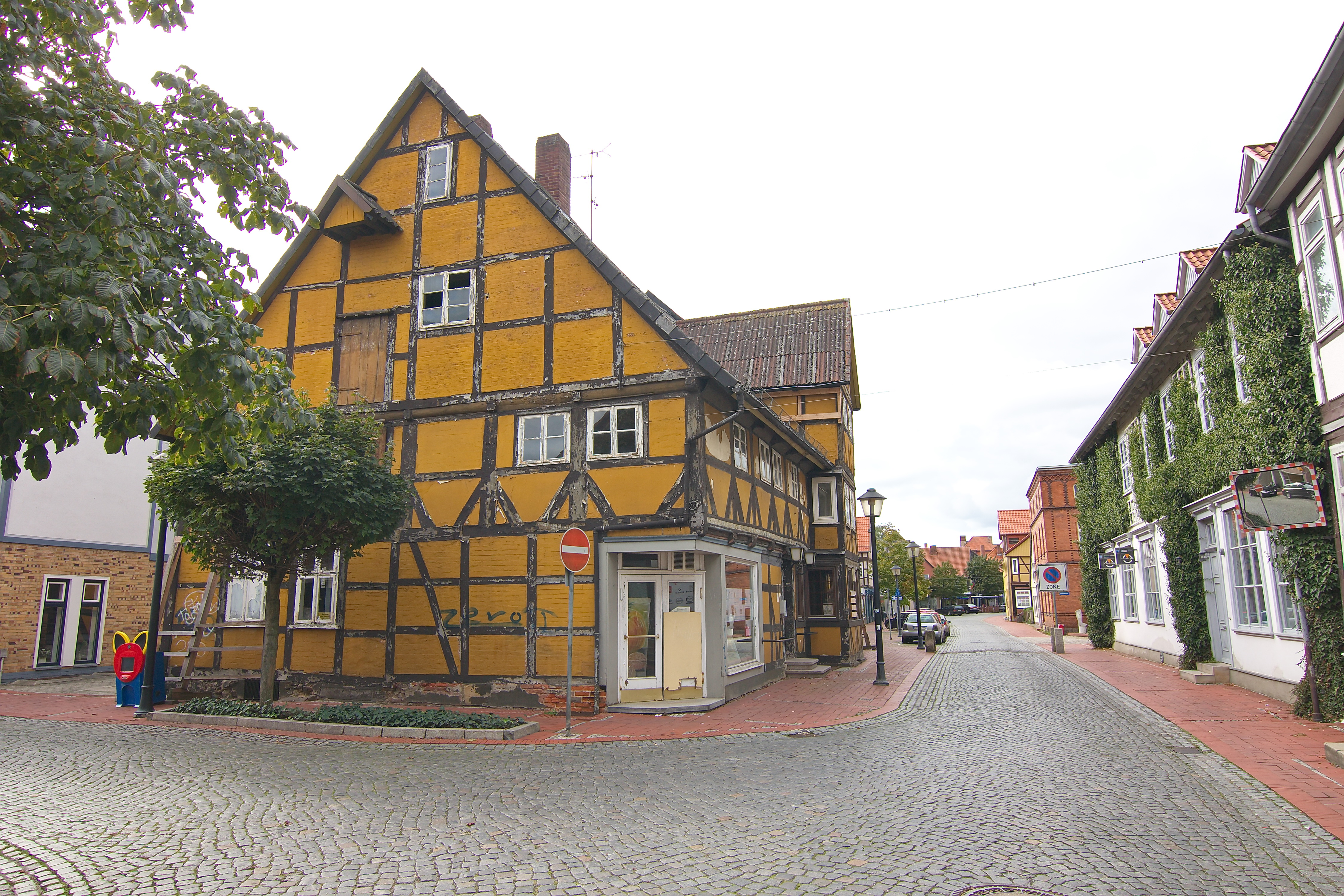 Das Haus Kreyenberg am ehemaligen Salzwedeler Tor (Klingentor) wurde 1640 nach einem Stadtbrand im 30jährigen Krieg errichtet.